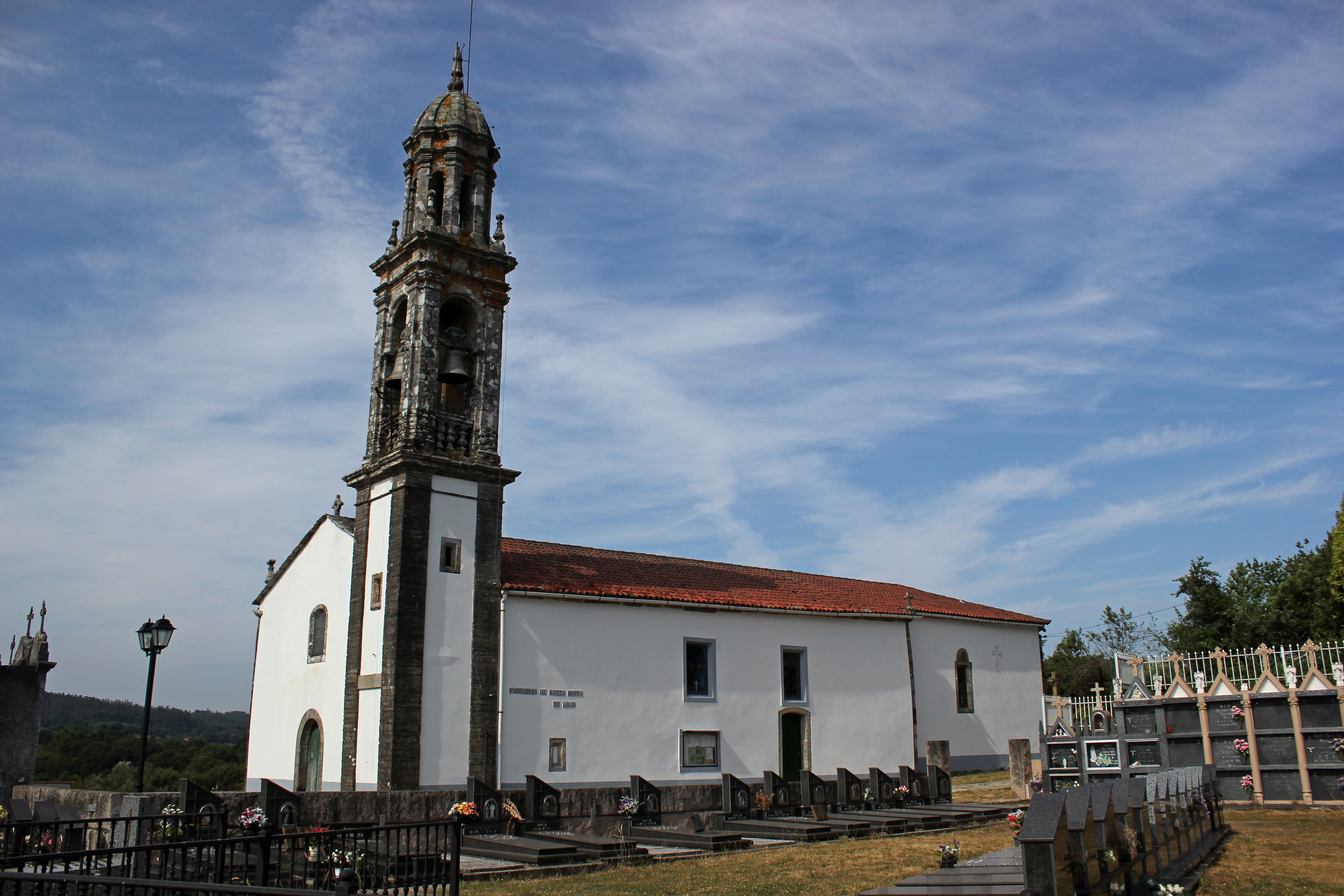 Igrexa de Loxo no concello de Touro.